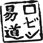 Originele logo van YiDo